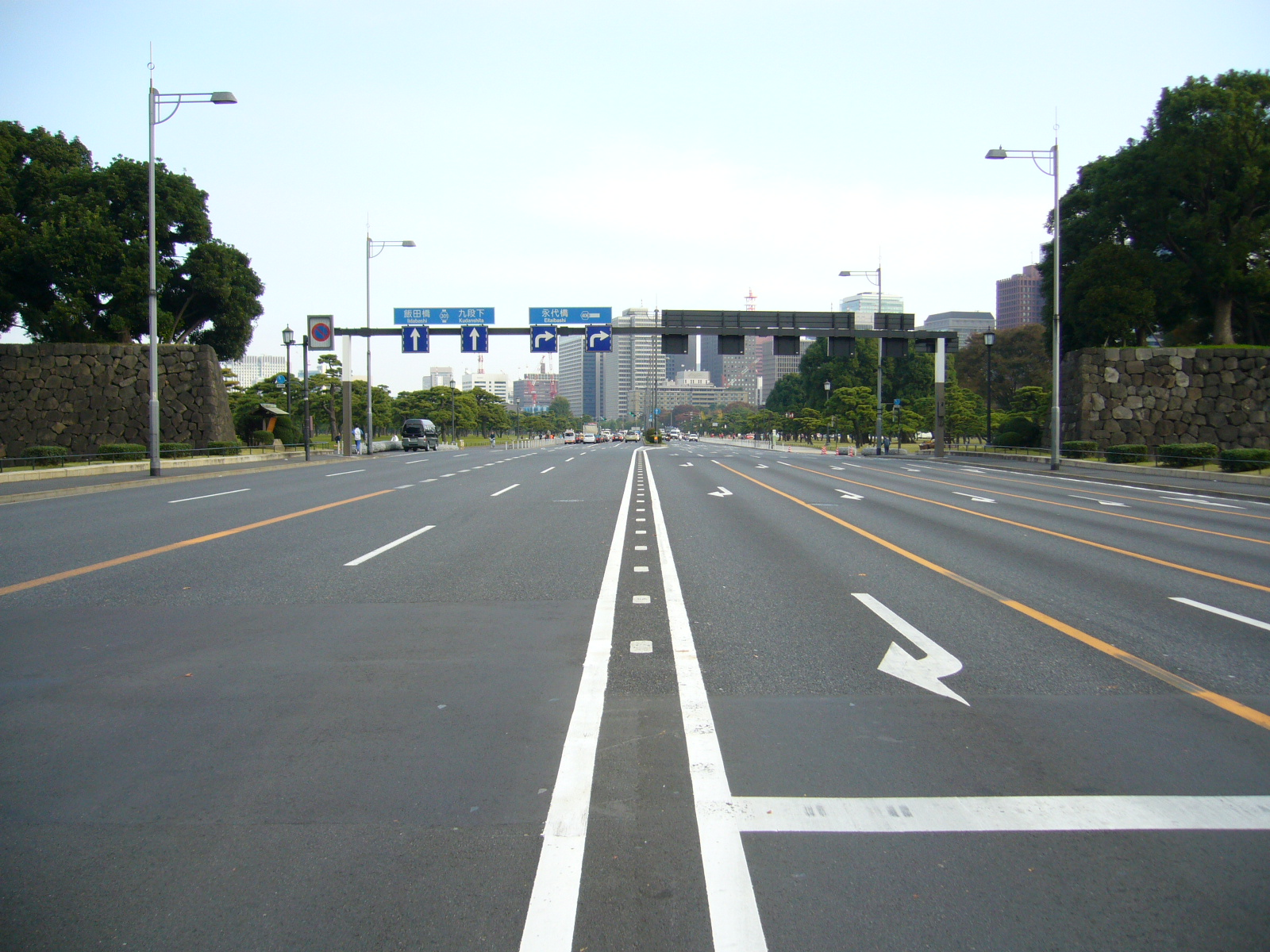 Uchibori-street,iwaida-bashi,chiyoda-city,japan.